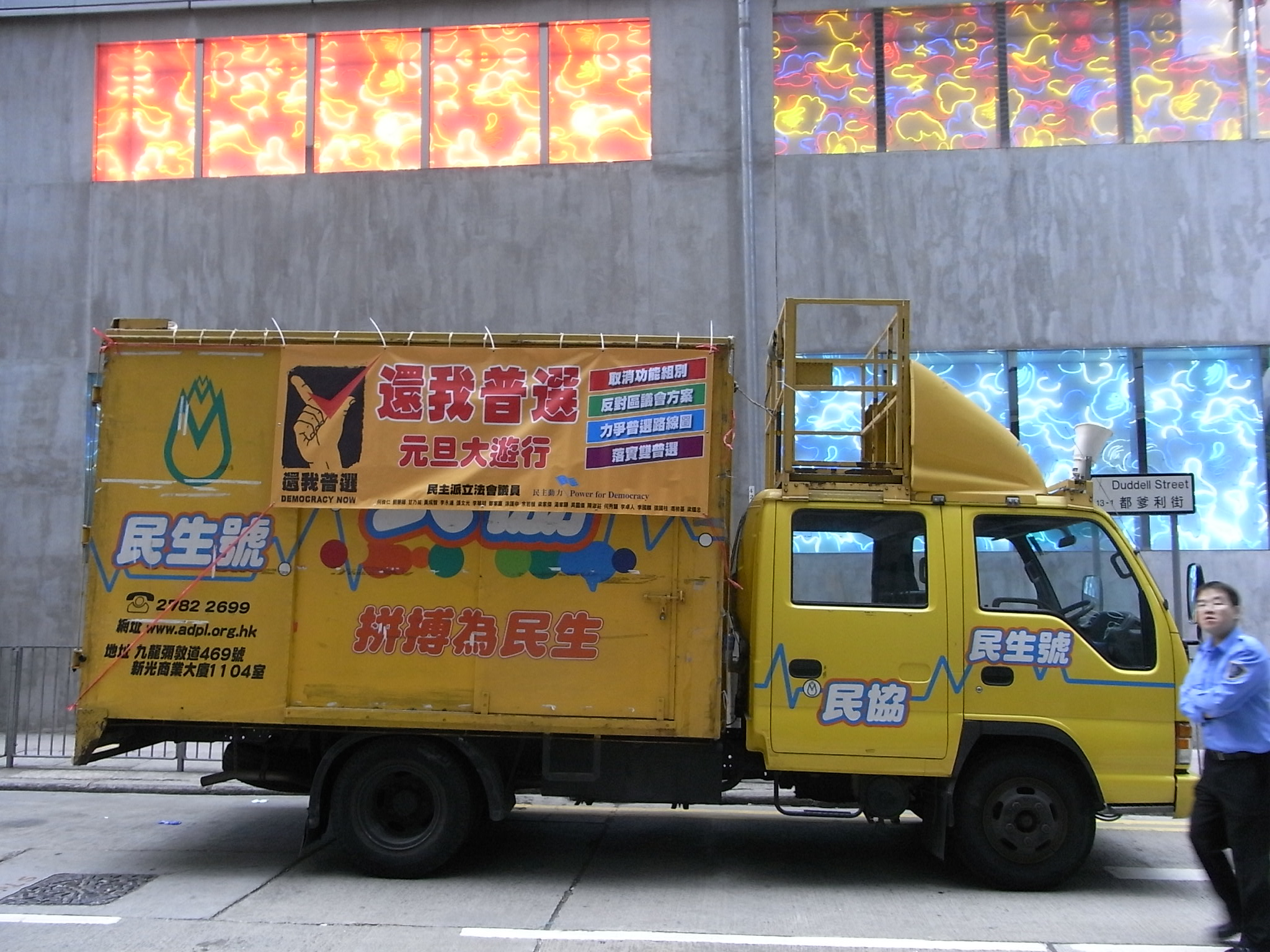 中文（香港）: 2010年-香港元旦示威